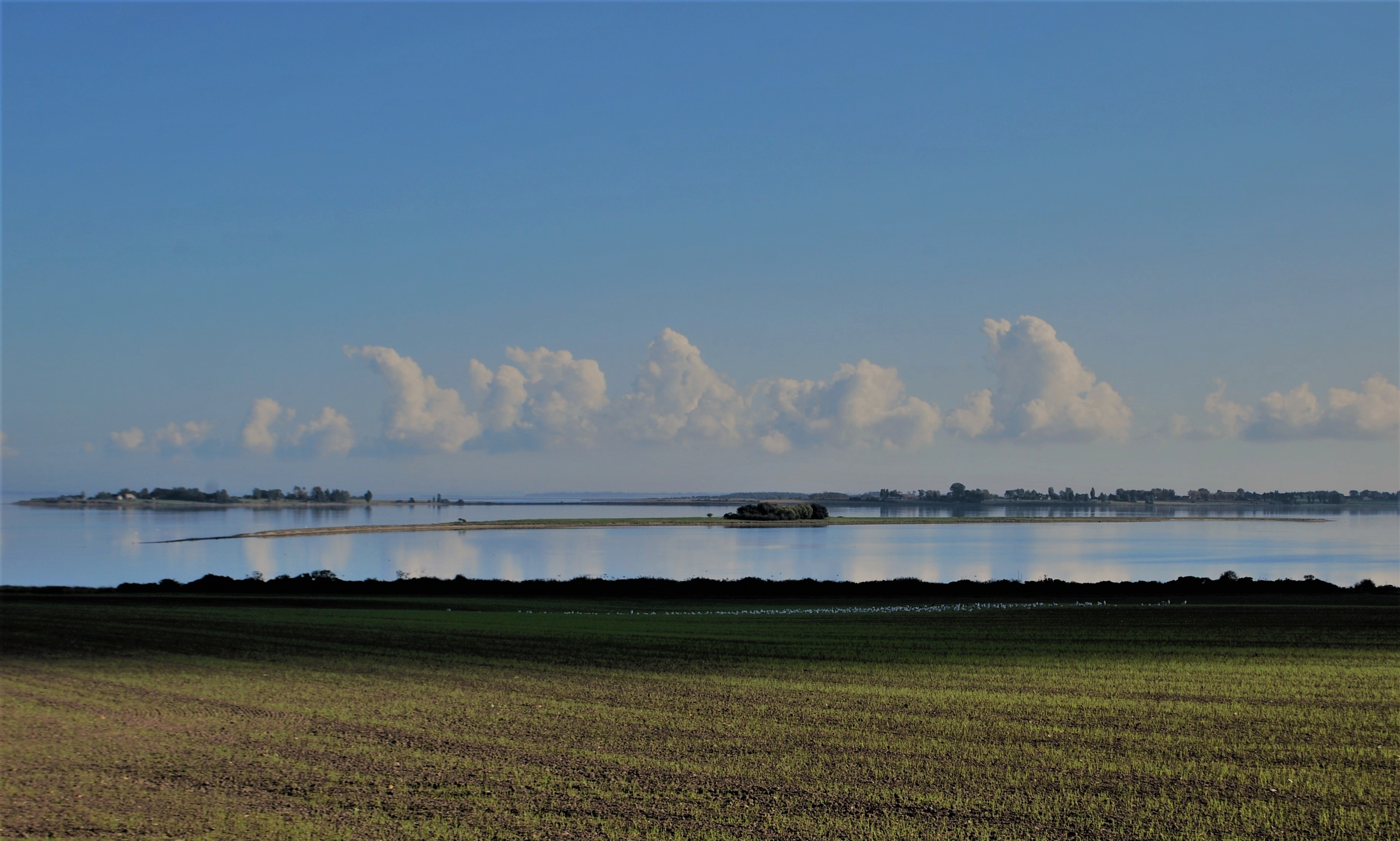 Lilleø er en 0,1 kvadratkilometer, 800 m lang, smal, to meter høj moræneø i Ommelbugten ved Ærøskøbing, Danmark